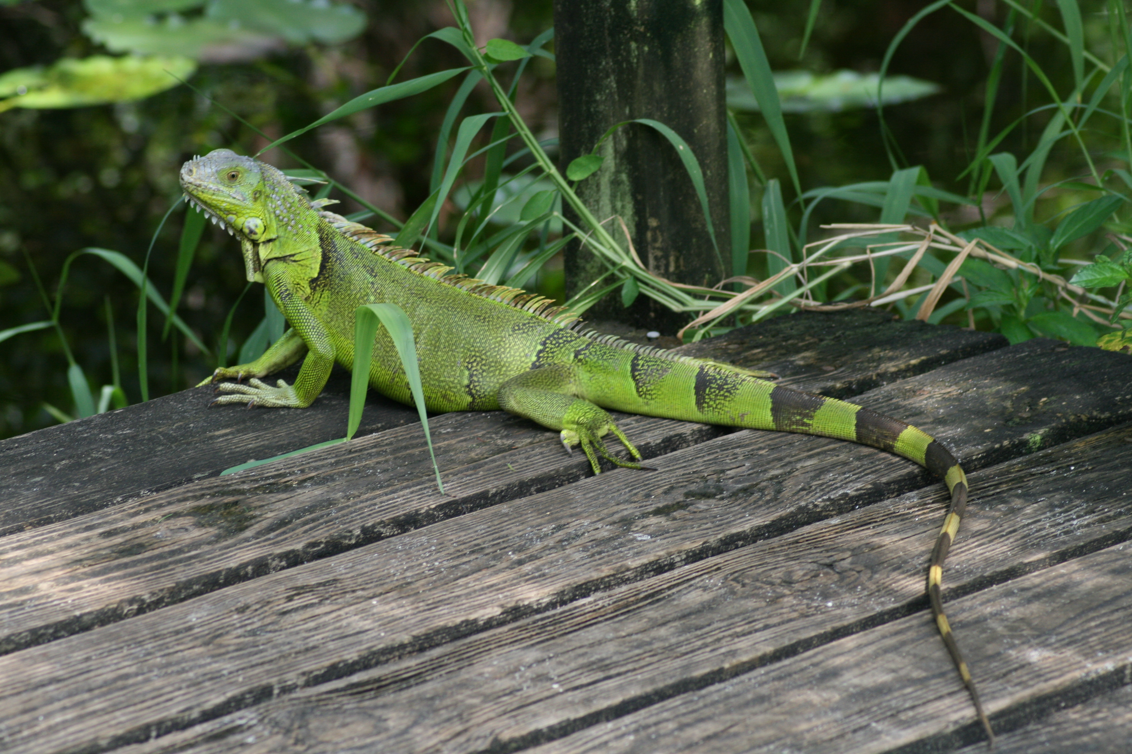 Iguana iguana seen in Fern Forest, Florida.